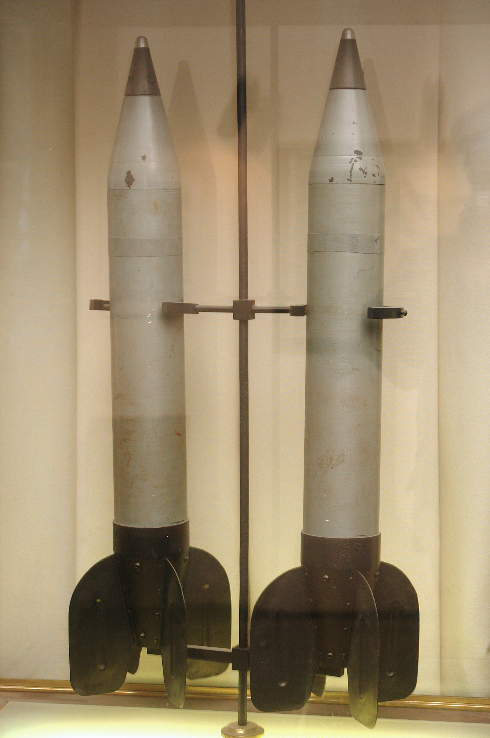 Ракетные снаряды РС-82. Музей космонавтики и ракетной техники; Санкт-Петербург. This photograph was taken in Museum of Space and Missile Technology (Saint Petersburg) Object location59° 57′ 07″ N, 30° 19′ 16″ E